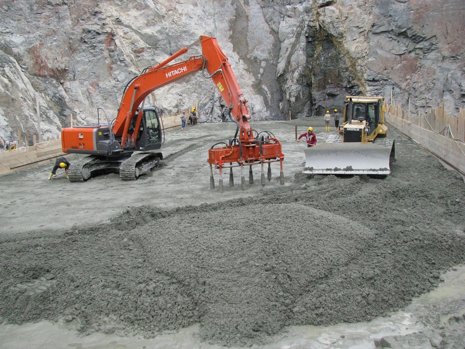 Yaşmaklı Barajı RCC Beton silindirle sıkıştırma işlemi